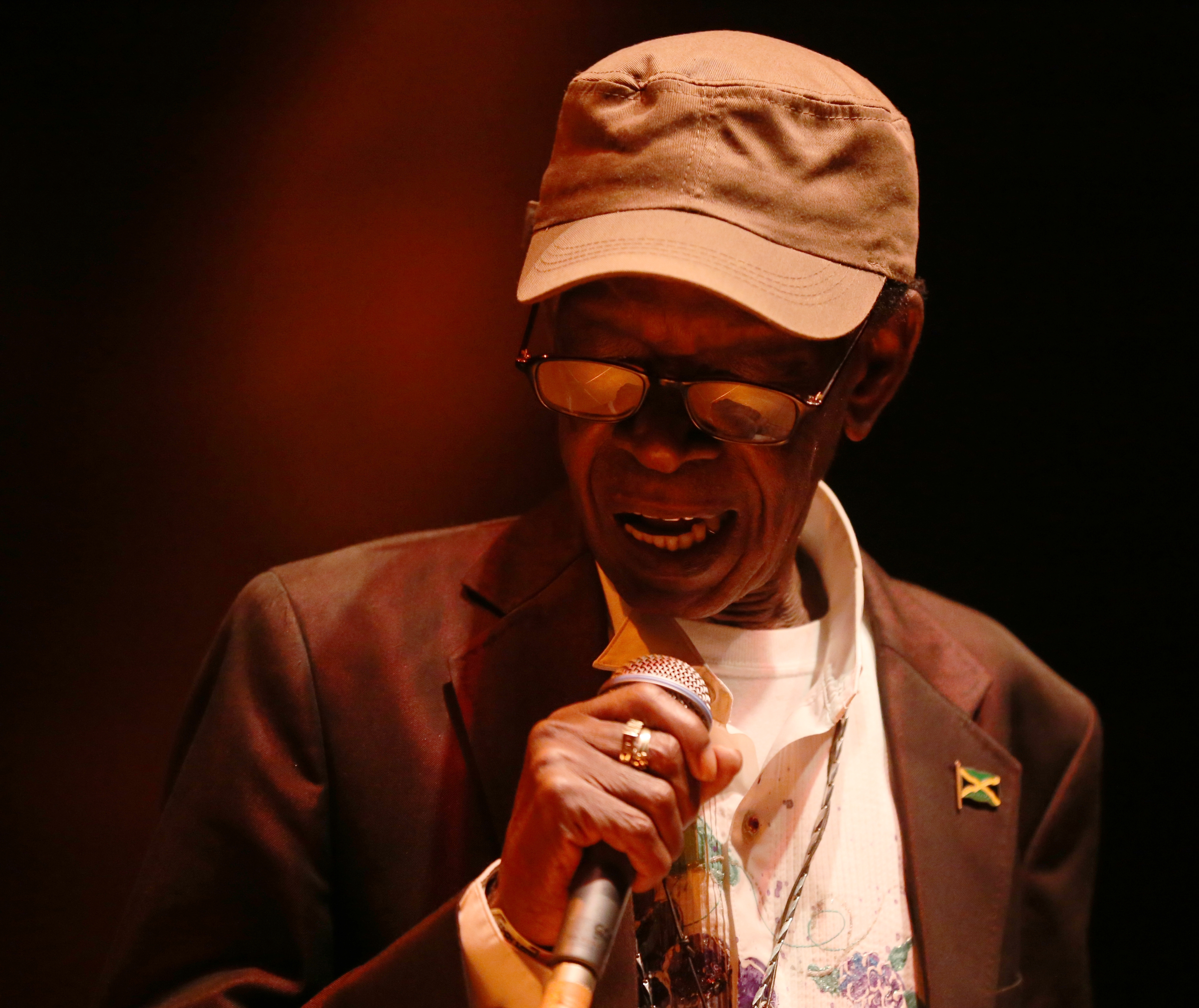 Stranger Cole & The Steadytones auf dem Chiemsee Reggae Summer Festival 2013 Festivalsommer This photo was created with the support of donations to Wikimedia Österreich and Wikimedia Deutschland in the context of the CPB project "Festival Summer".